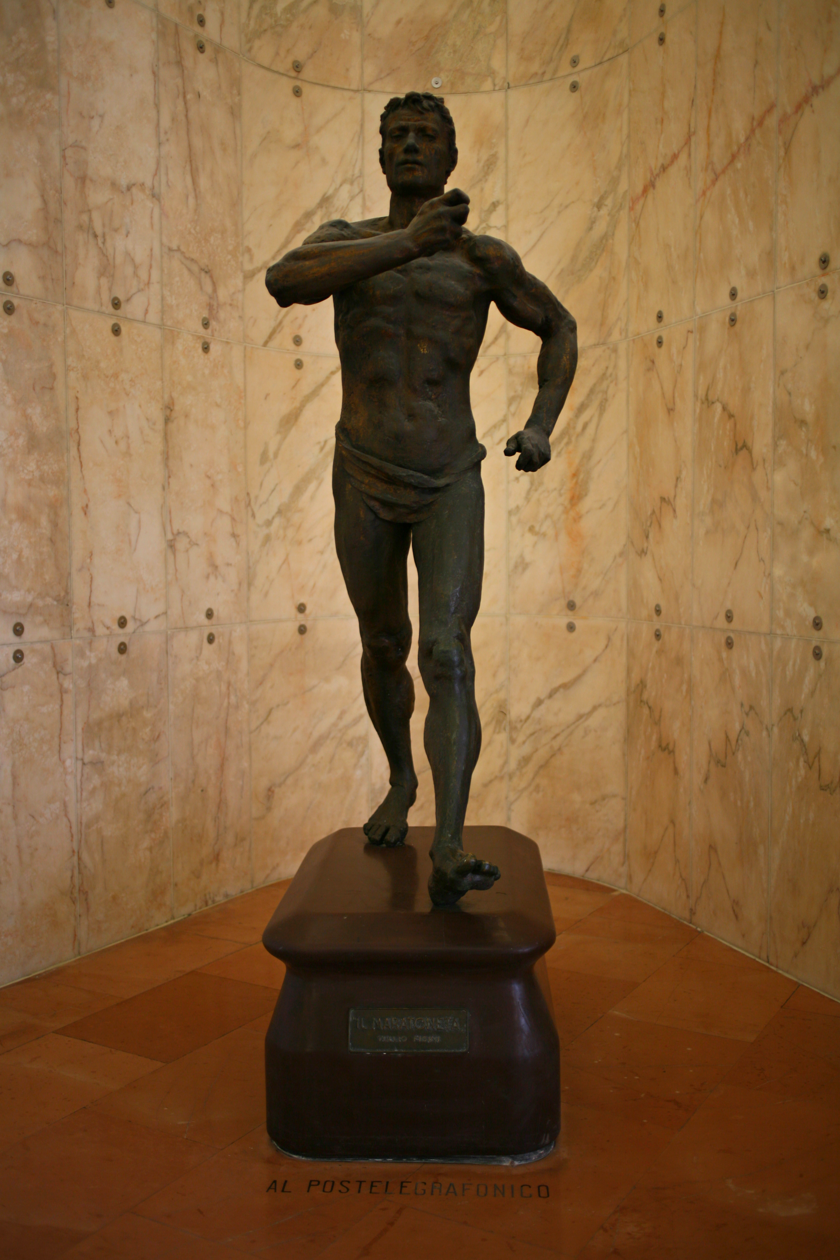 Tullio Figini Il maratoneta dedica Al postelegrafonico Palazzo delle Poste (Milano)